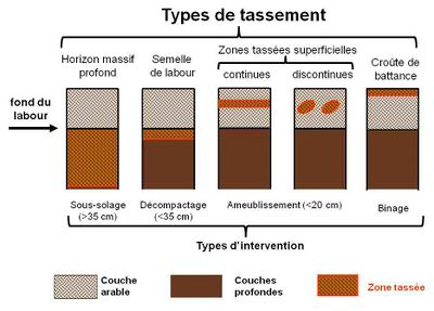 Types de compaction du sol superficielle (en surface) ou intermédiaire (semelle de labour). La compaction en profondeur n'est pas représentée.